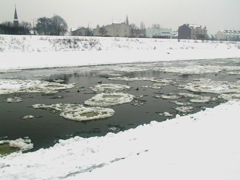 Śryż